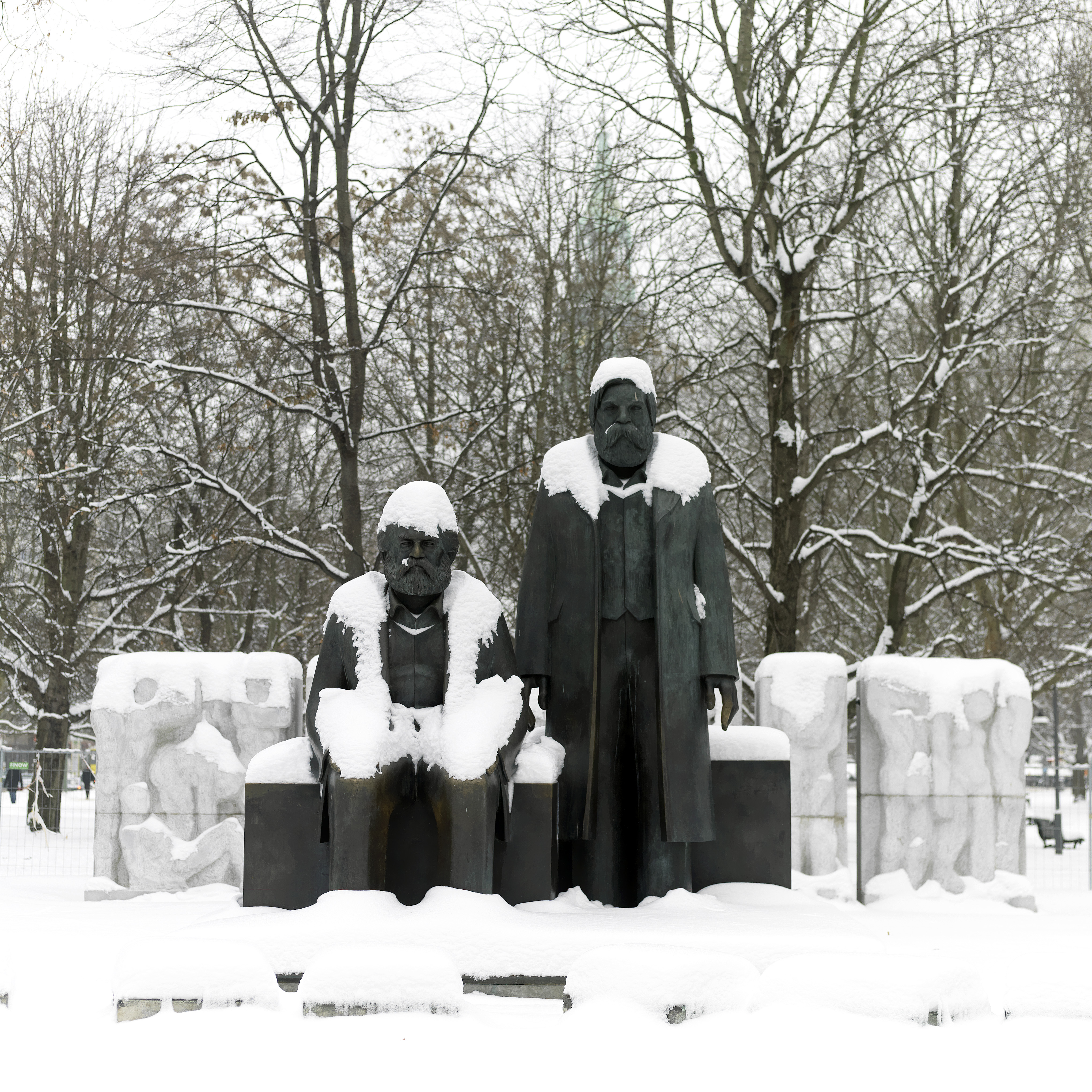 Das Marx-Engels-Forum in Berlin-Mitte mit dem Marx-Engels-Denkmal während Umbauten im Januar 2011.